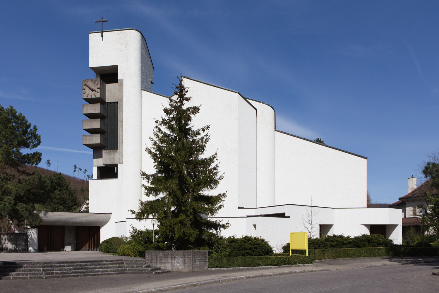 Die katholische Marienkirche in Zwingen (BL)